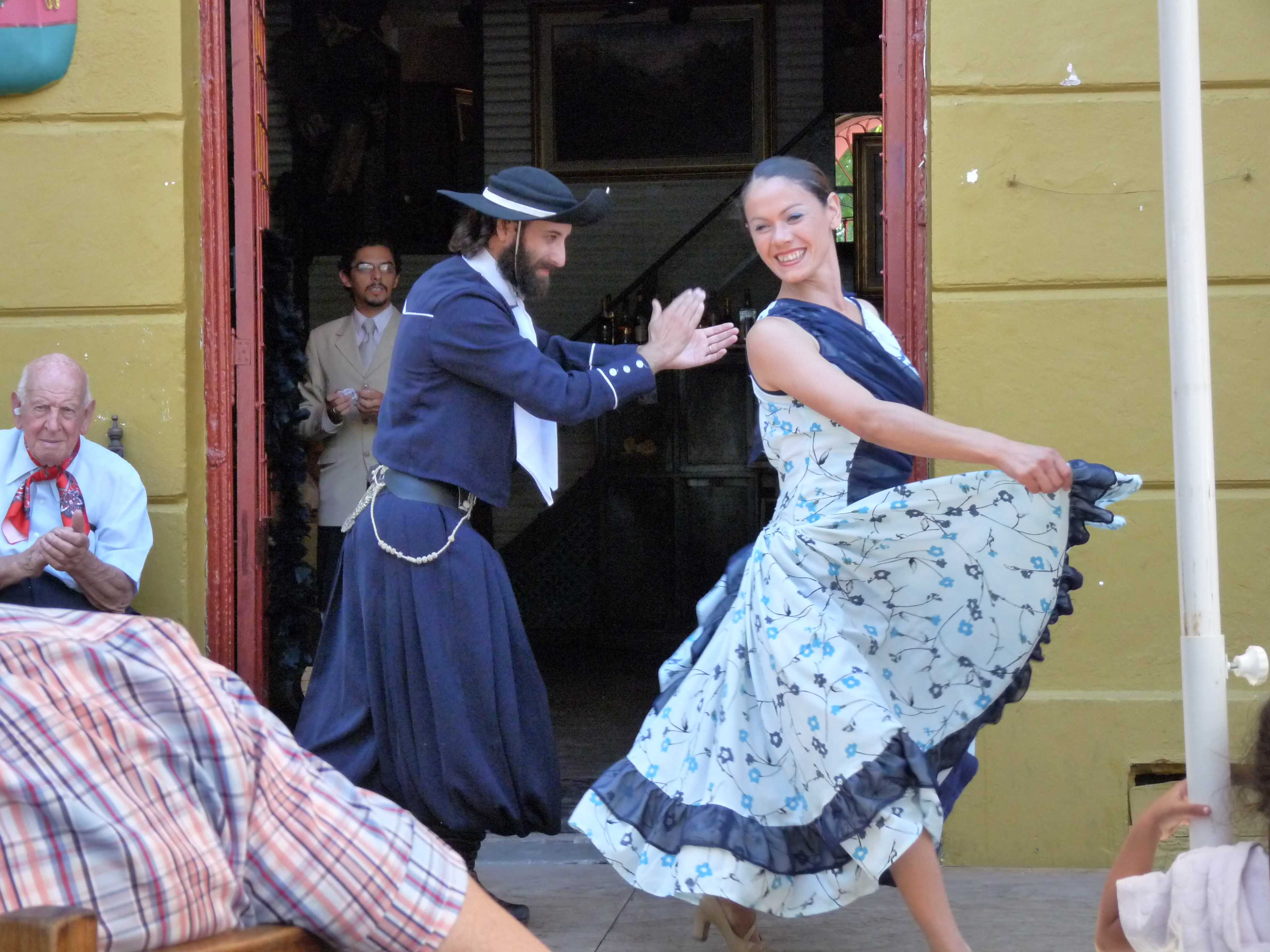 Camanita Tango 01